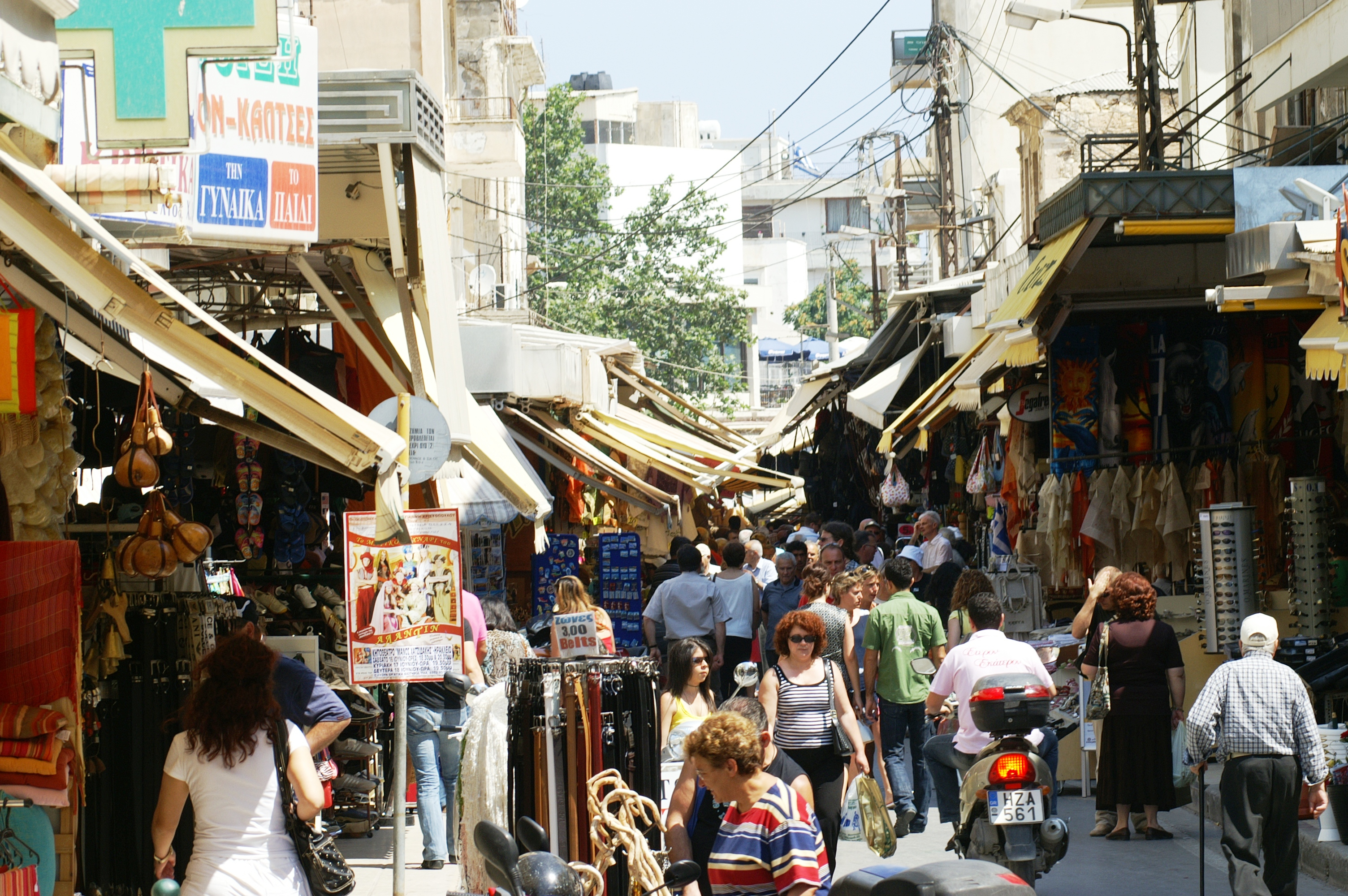 die Stadt Iraklio ist die größte Stadt der südgriechischen Insel Kreta